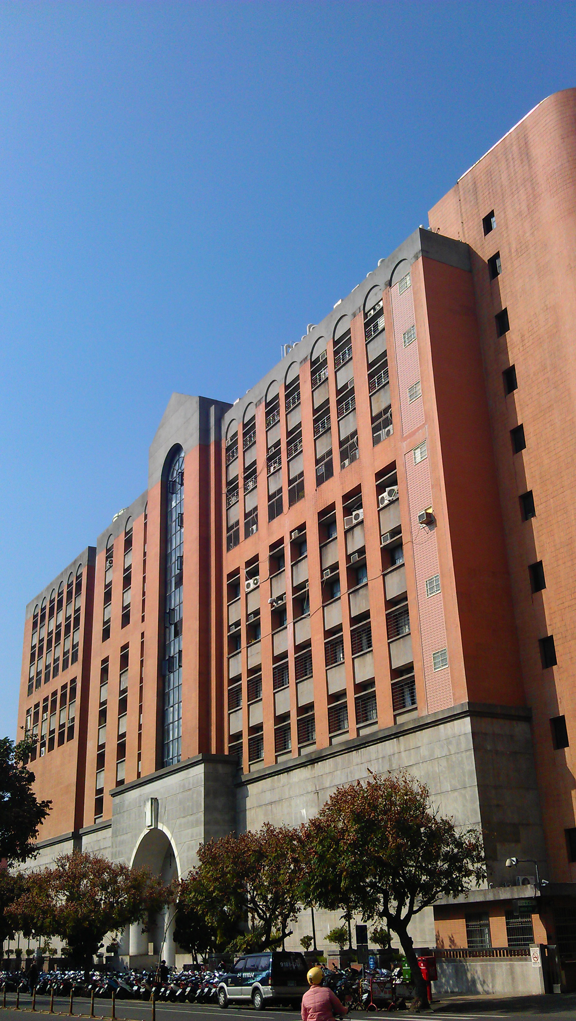 中國醫藥大學校舍